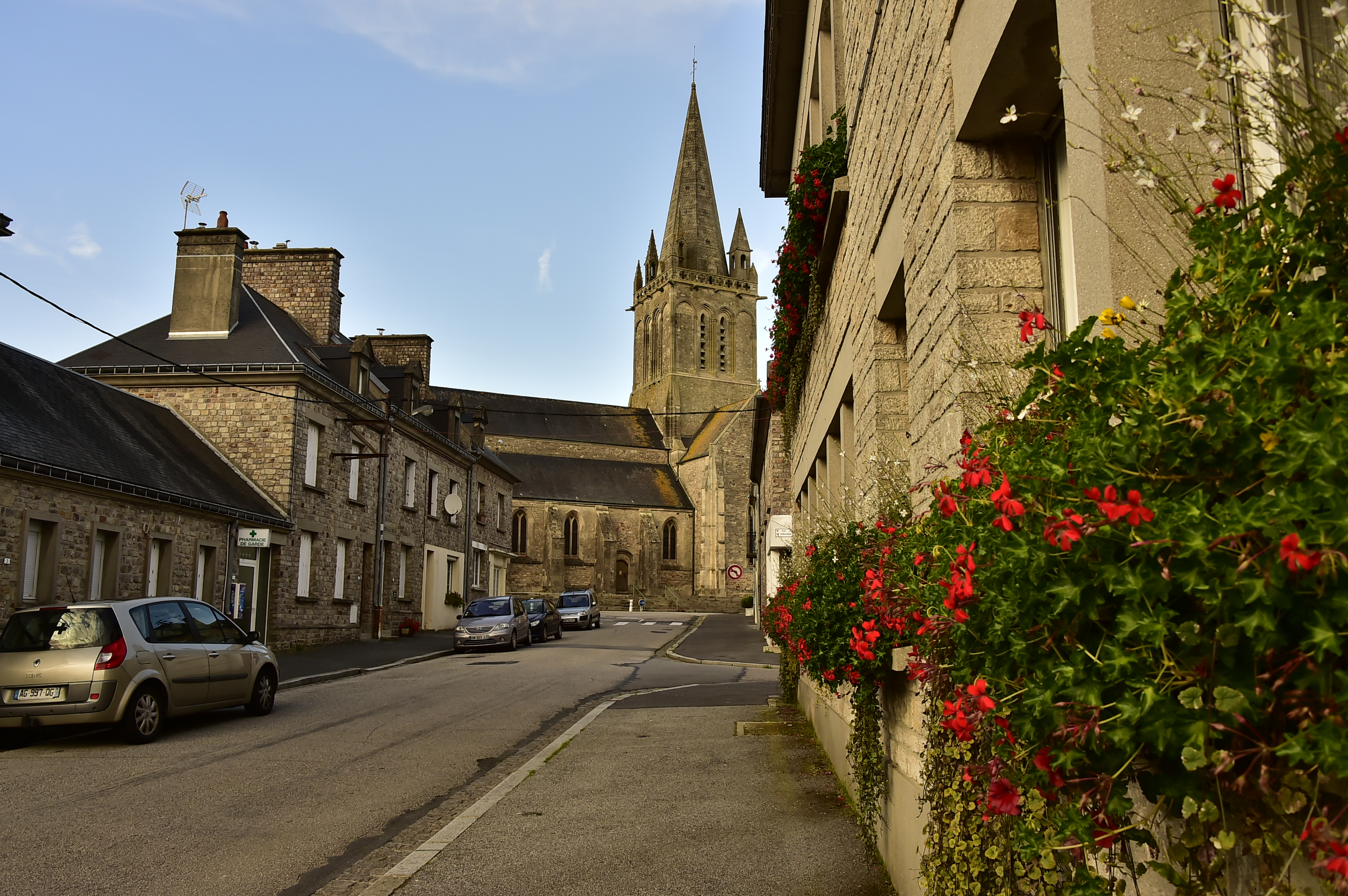 Montebourg